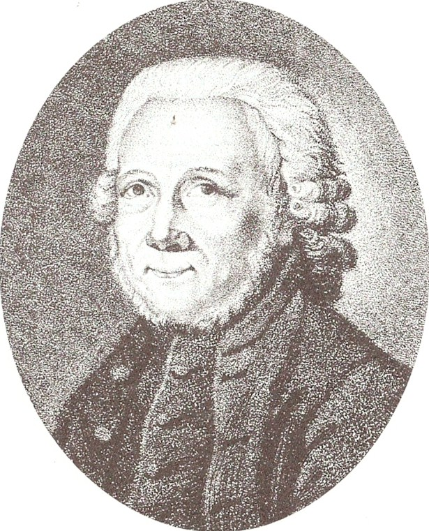 Abraham Wolff (??-1798), jüdischer Mathematiker in Berlin